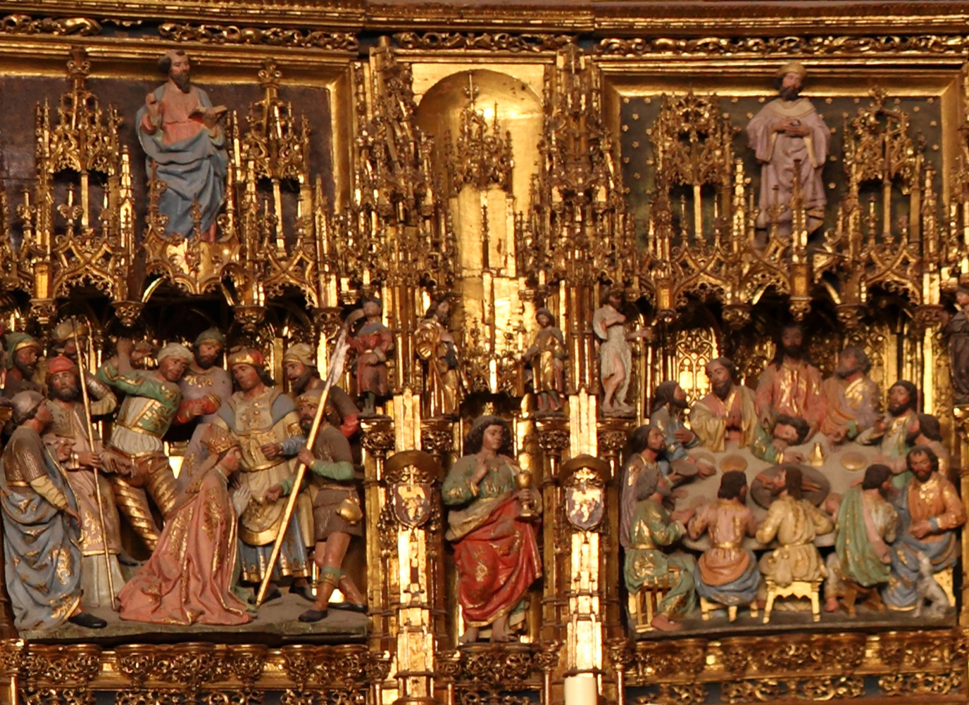 Detalle de dos relieves correspondientes a la predela del retablo mayor de la Catedral de Toledo( España)